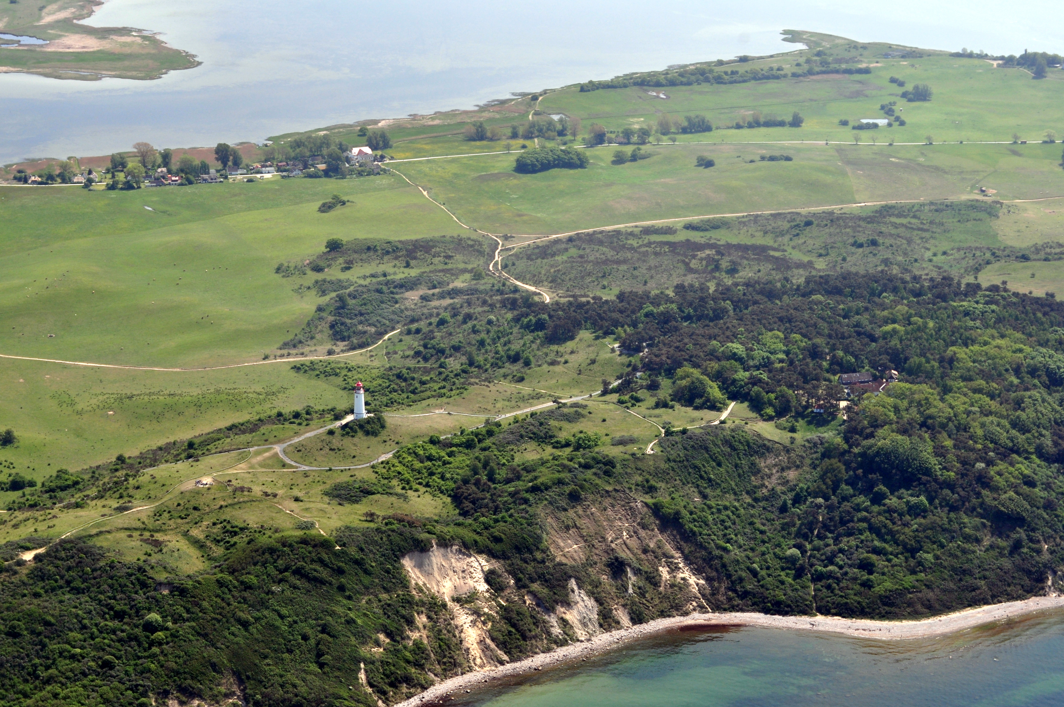 Die Bilder wurden von mir während eines einstündigen Rundflugs ab Flugplatz Güttin am 21. Mai 2011 aufgenommen. Die Bildbeschreibung steht im Dateinamen. Aufgenommen mit einer Nikon D5000 durch das Seitenfenster des Flugzeugs. Der Bakenberg ist rechts, links der Leuchtturm Dornbusch auf dem rund 70 Meter hohen Schluckswiek oder Schluckwieksberg